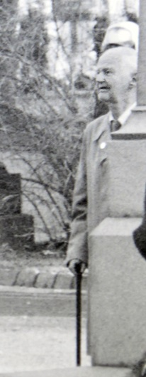 Gustaf Ekström närvarade på 30 novemberföreningens kransnedläggning vid Tegnér statyn i Lund 1994.